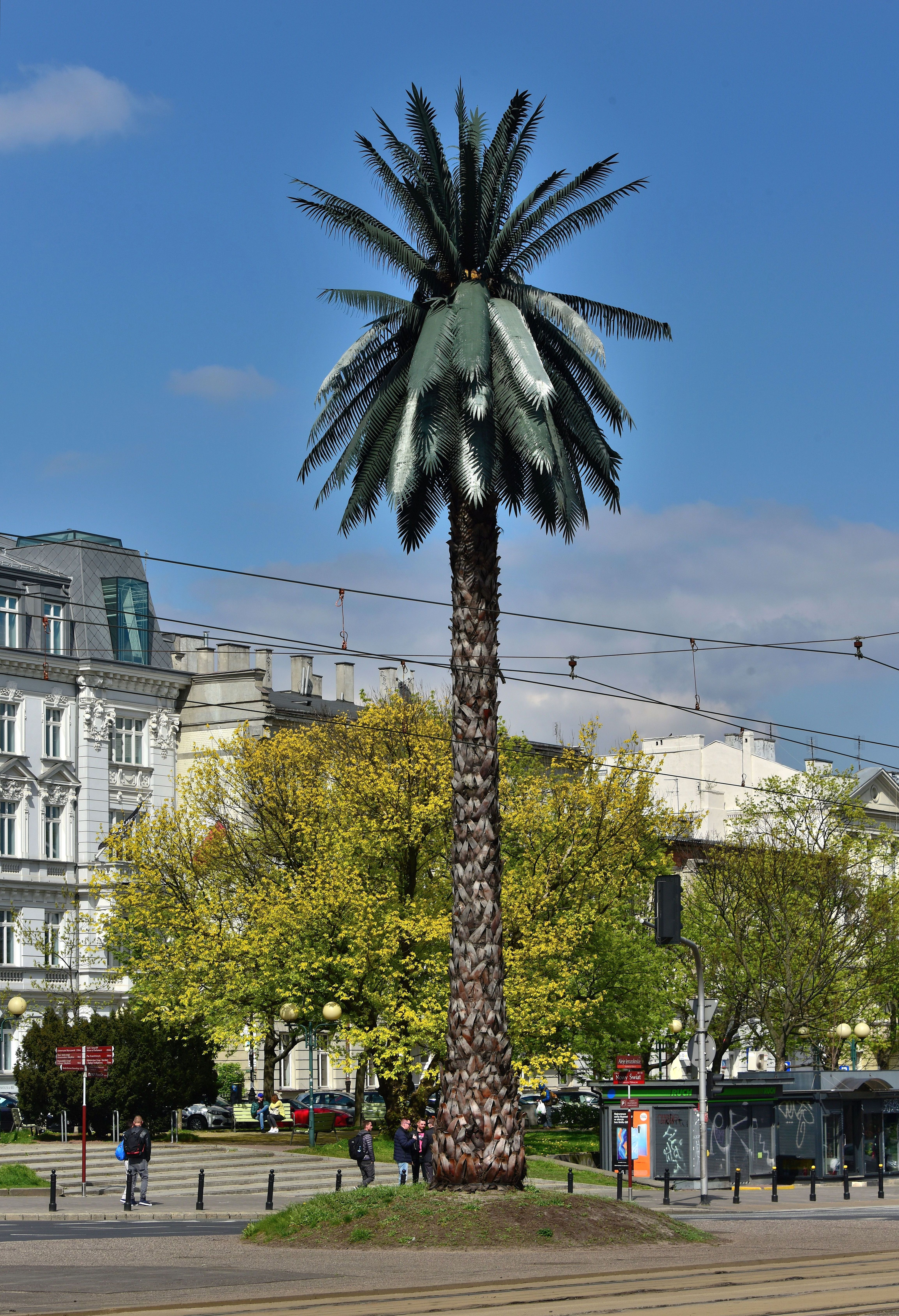 Sztuczna palma na rondzie gen. Charles’a de Gaulle’a w Warszawie